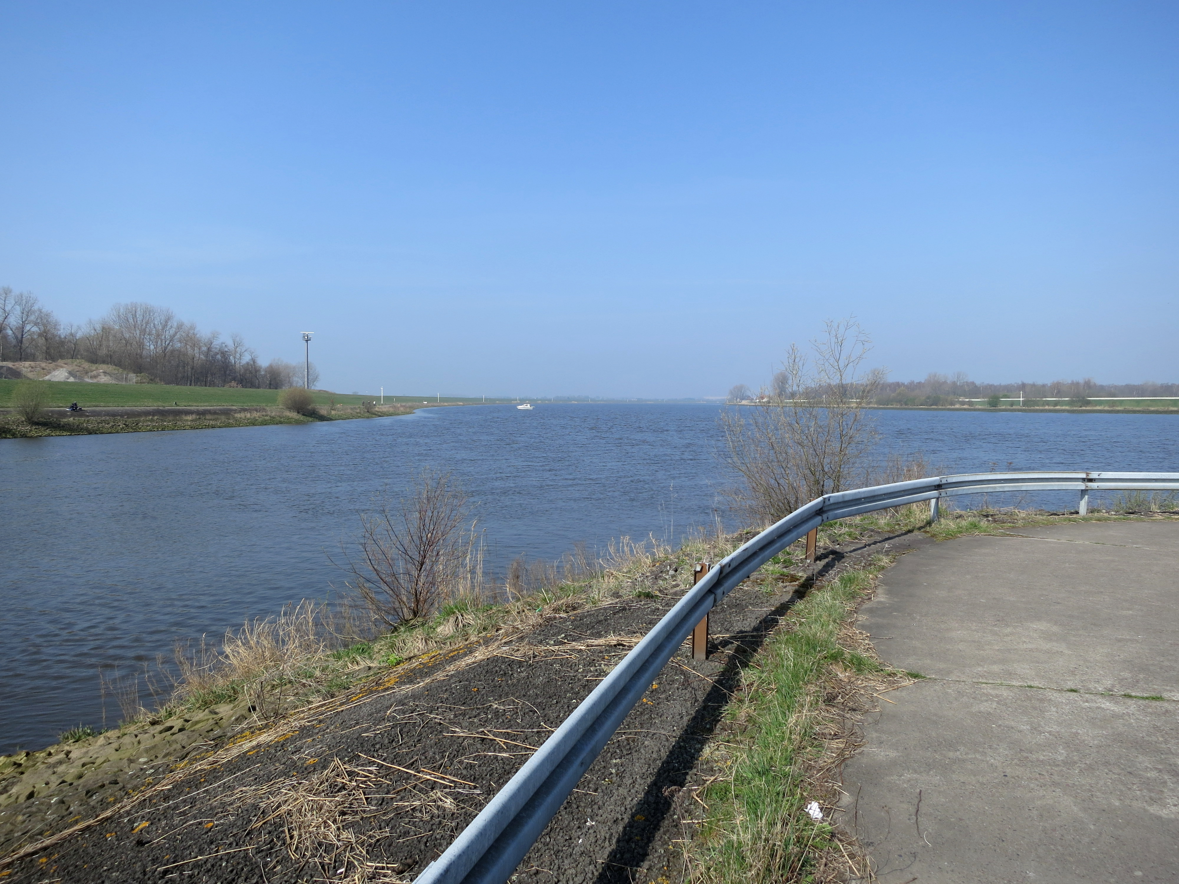 Mündung der Ochtum (von links) in die Weser